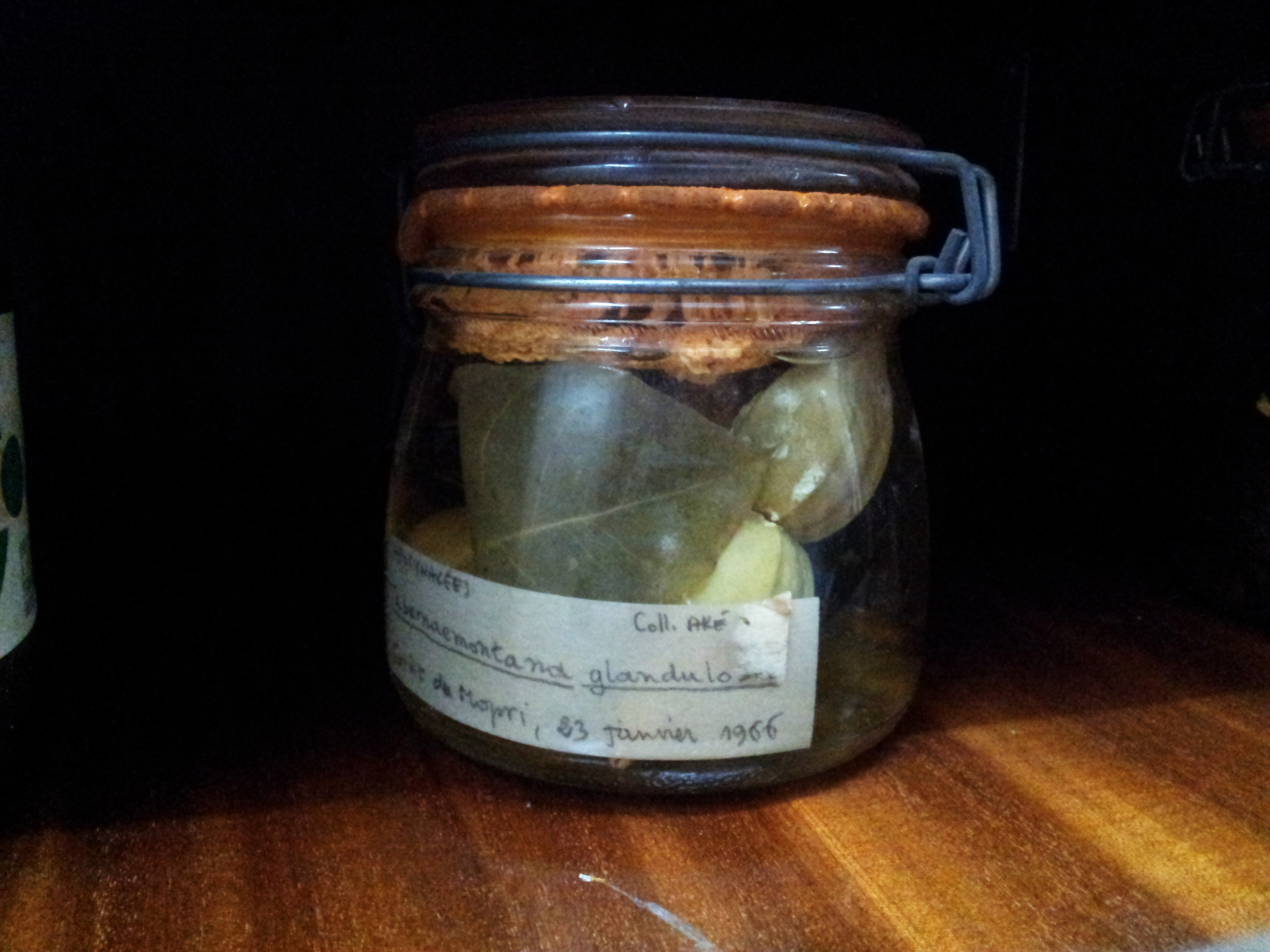 Un spécimen de l'herbier du Centre national de floristique, à l'Université Félix Houphouët Boigny à Abidjan.